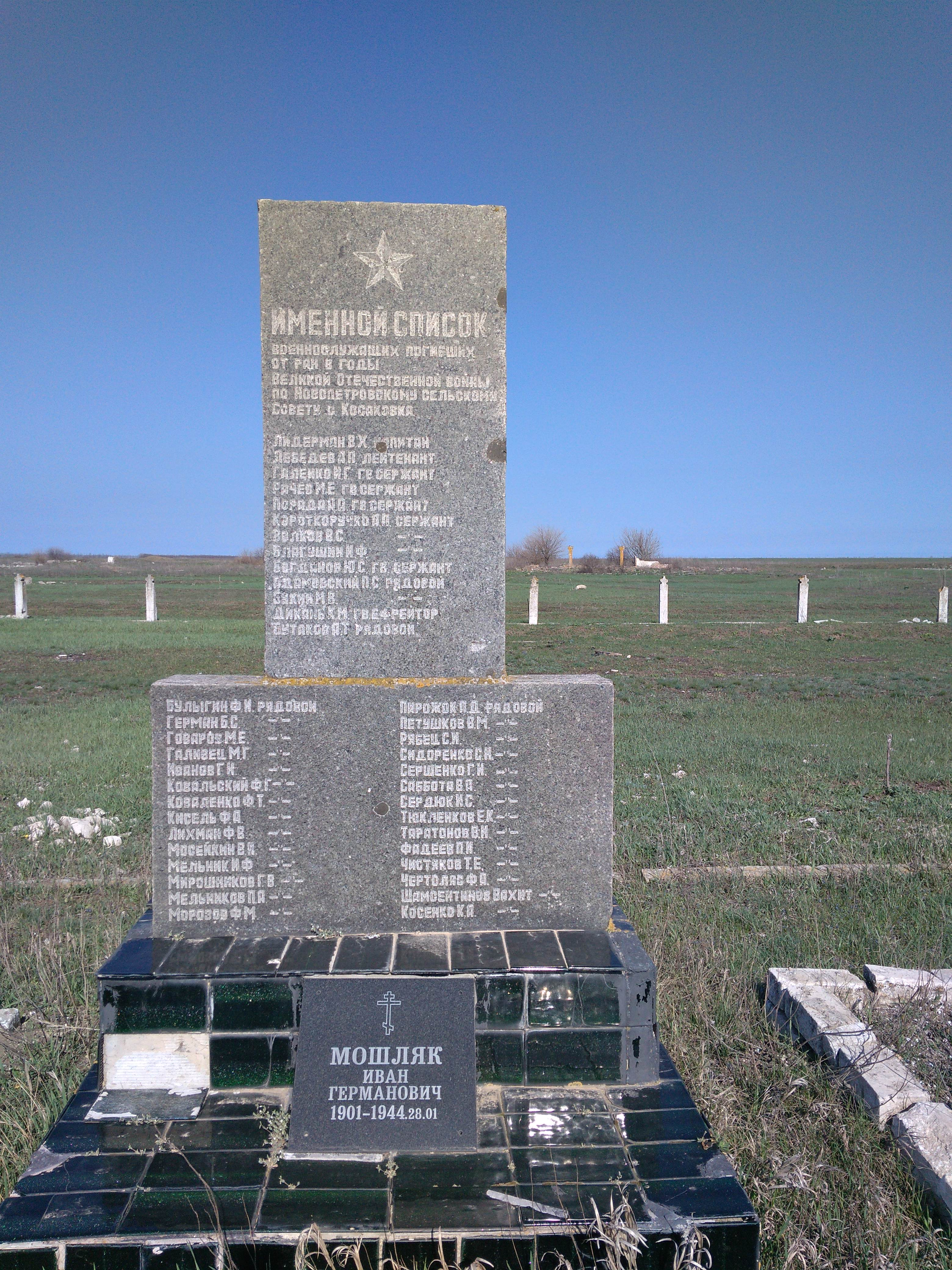 Пам'ятний знак в с. Косаківці на честь воїнів Другої світової війни.